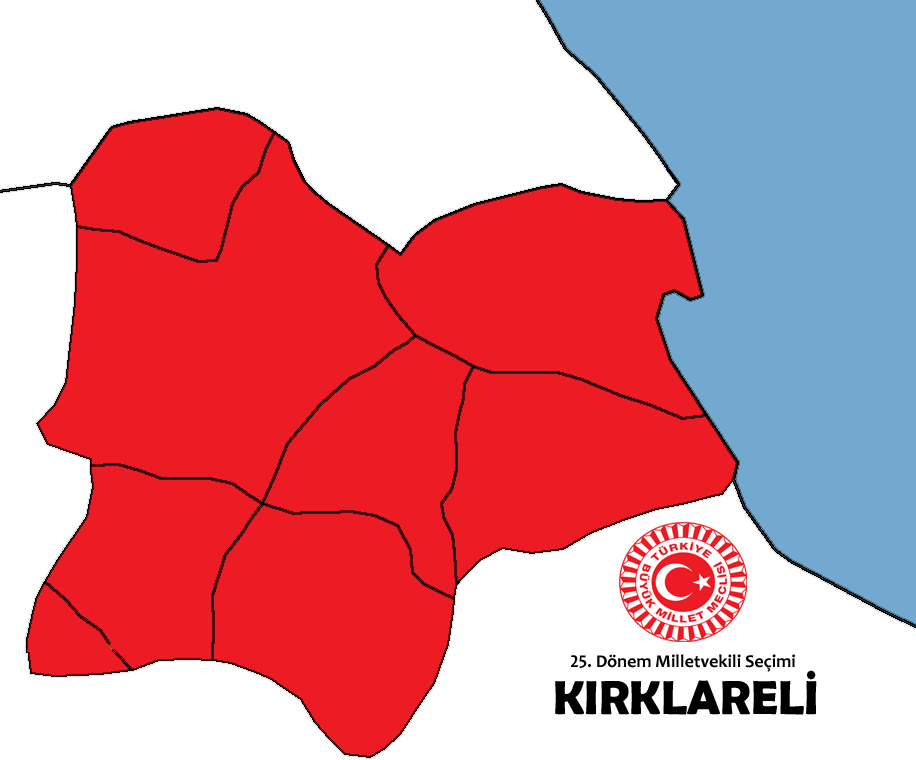 2015 genel seçim sonuçları